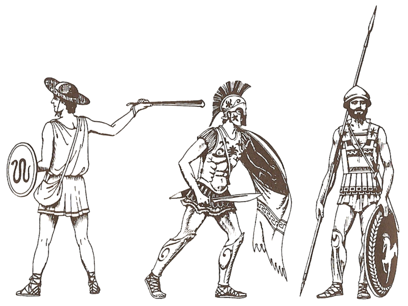 Funditor et hoplitae V saec. a.C.n.